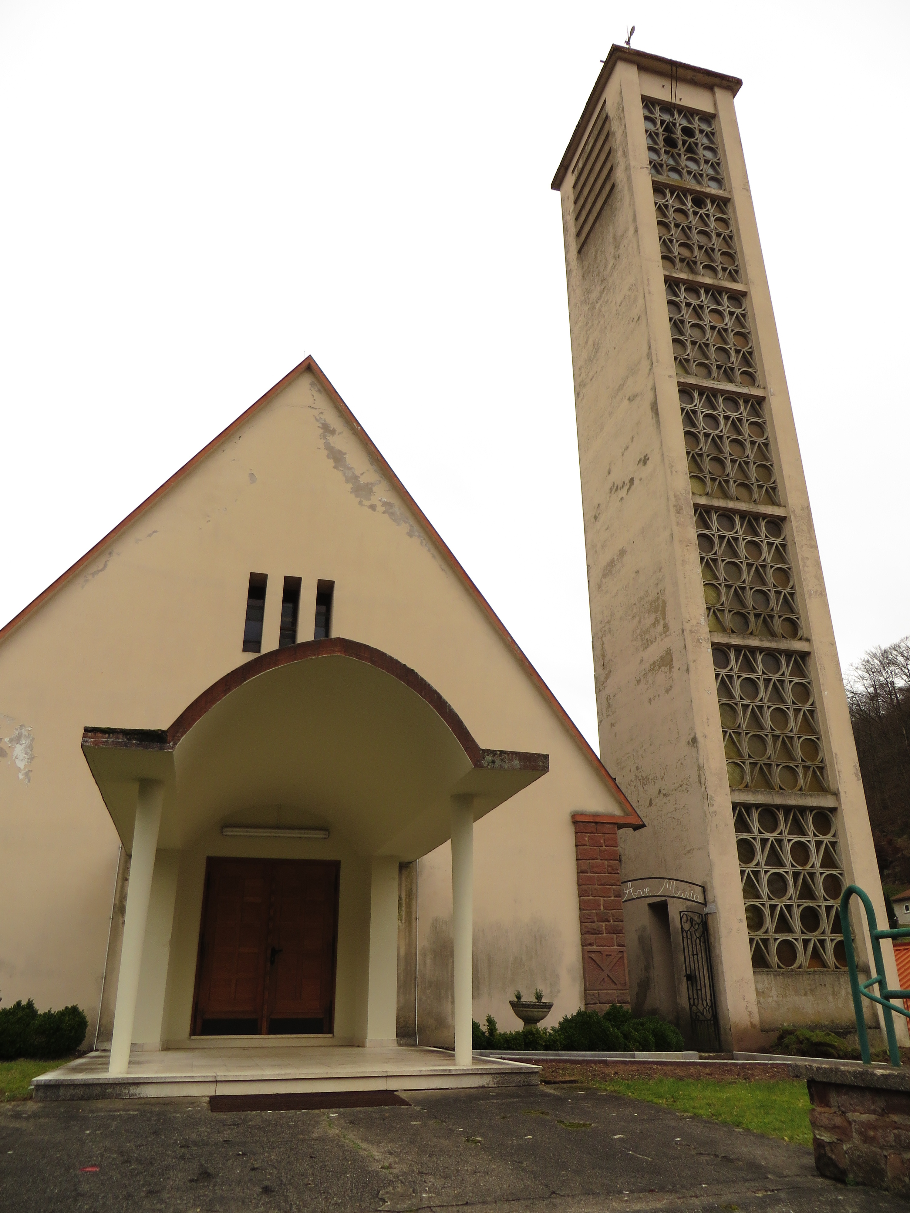 Hanviller eglise